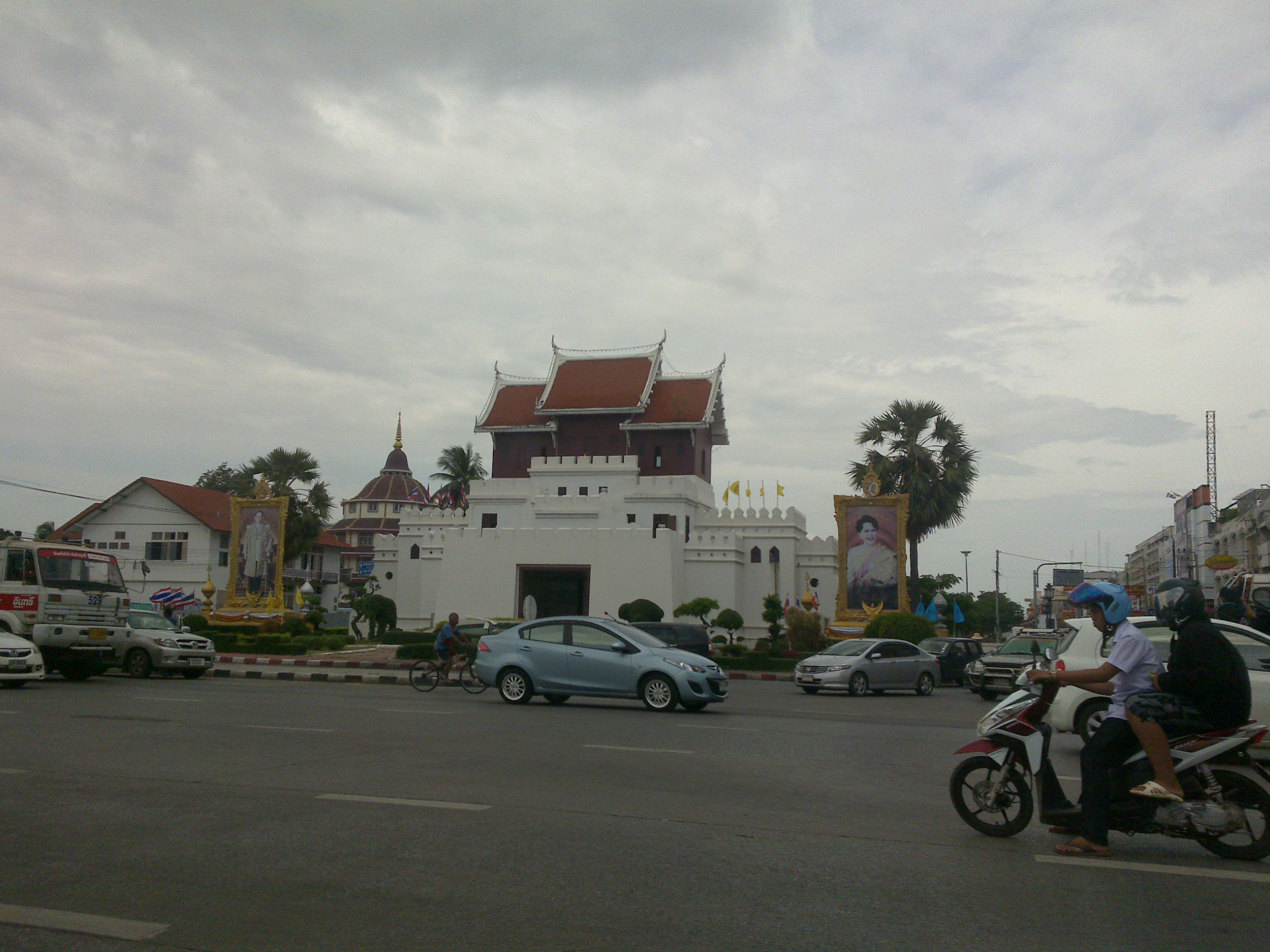 City of Nakhon Ratchasima, Thailand